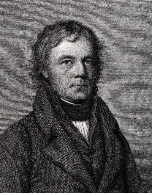 Leander van Eß